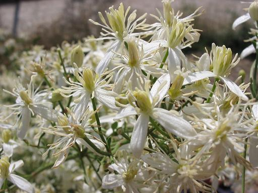 Foto realizadas en un ejemplar de 200 cm de altura, mes de Julio, en la zona Este de España (Valencia) por Alberto Salguero Quiles (P40p).